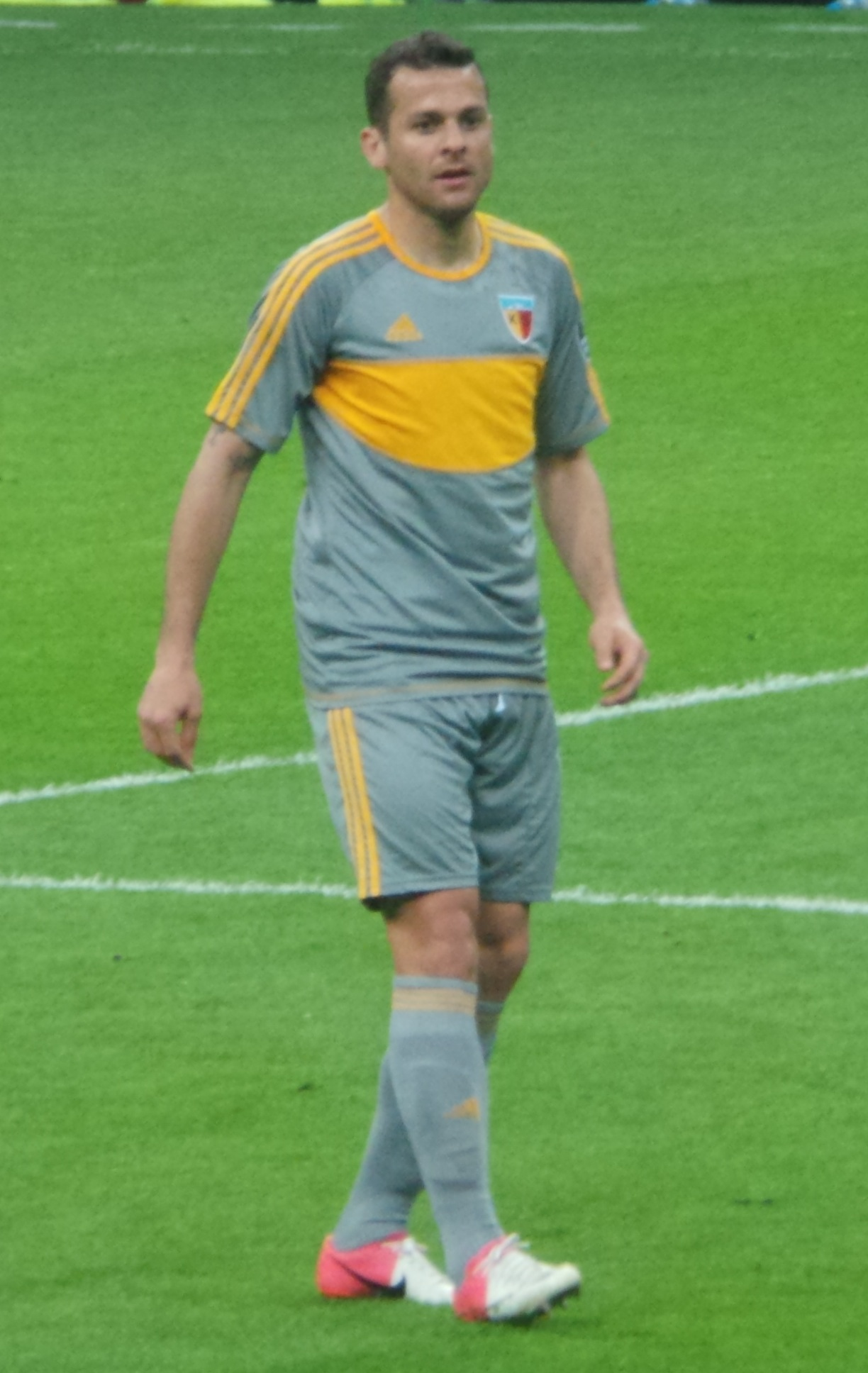 Bobo'14